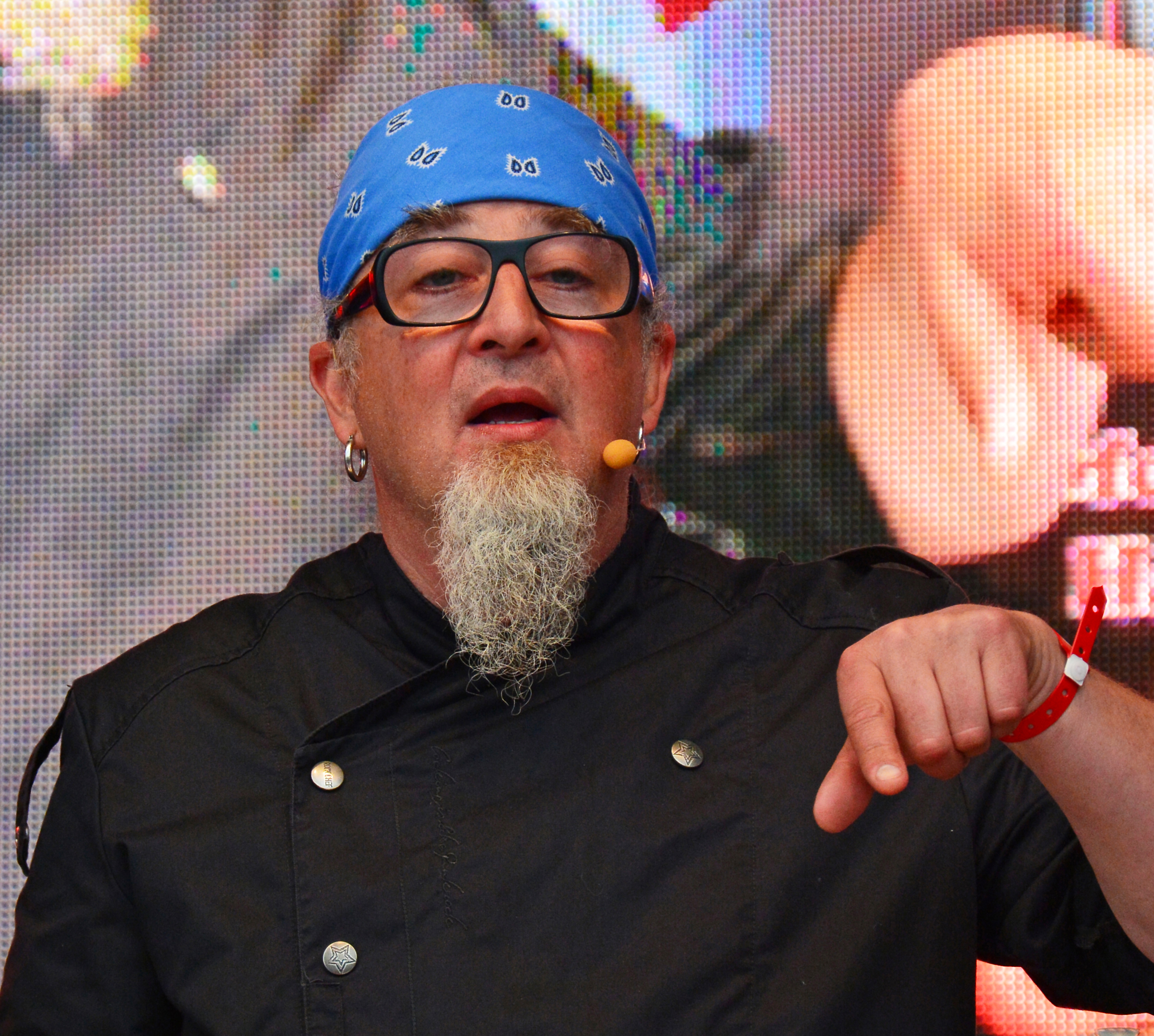 Der Fernsehkoch Stefan Marquard beim 825. Hamburger Hafengeburtstag 2014